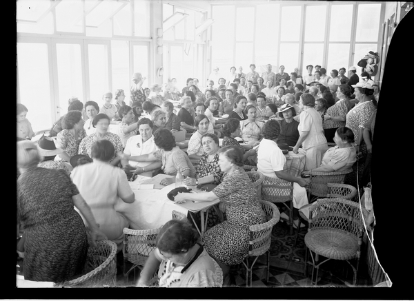 ועידת ויצ"ו, תל אביב, מראה כללי של המשתתפות בועידה